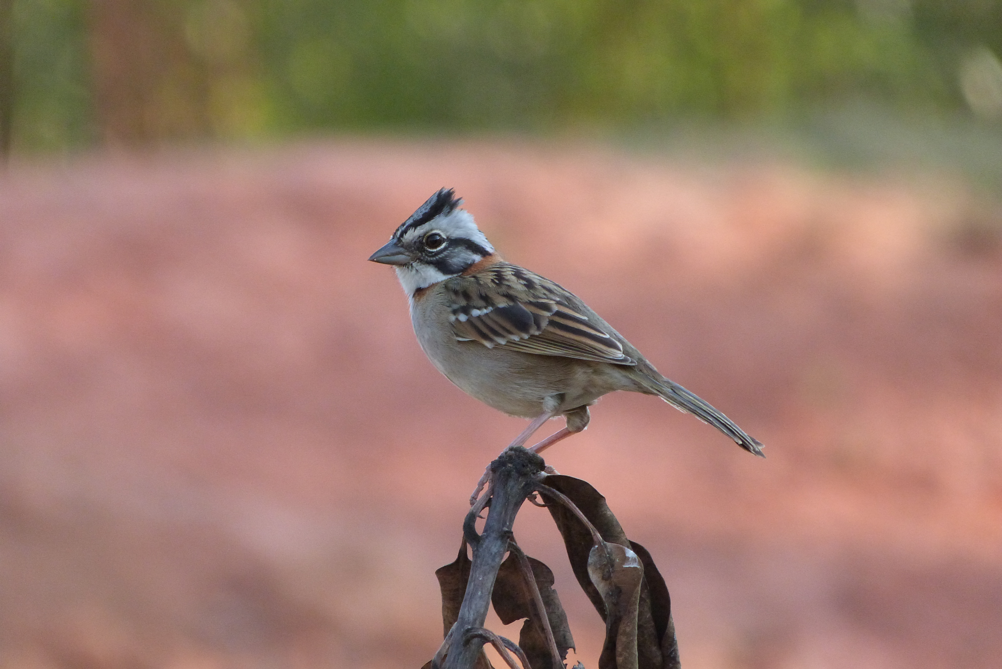 Foto tirada em Entre Rios - MG